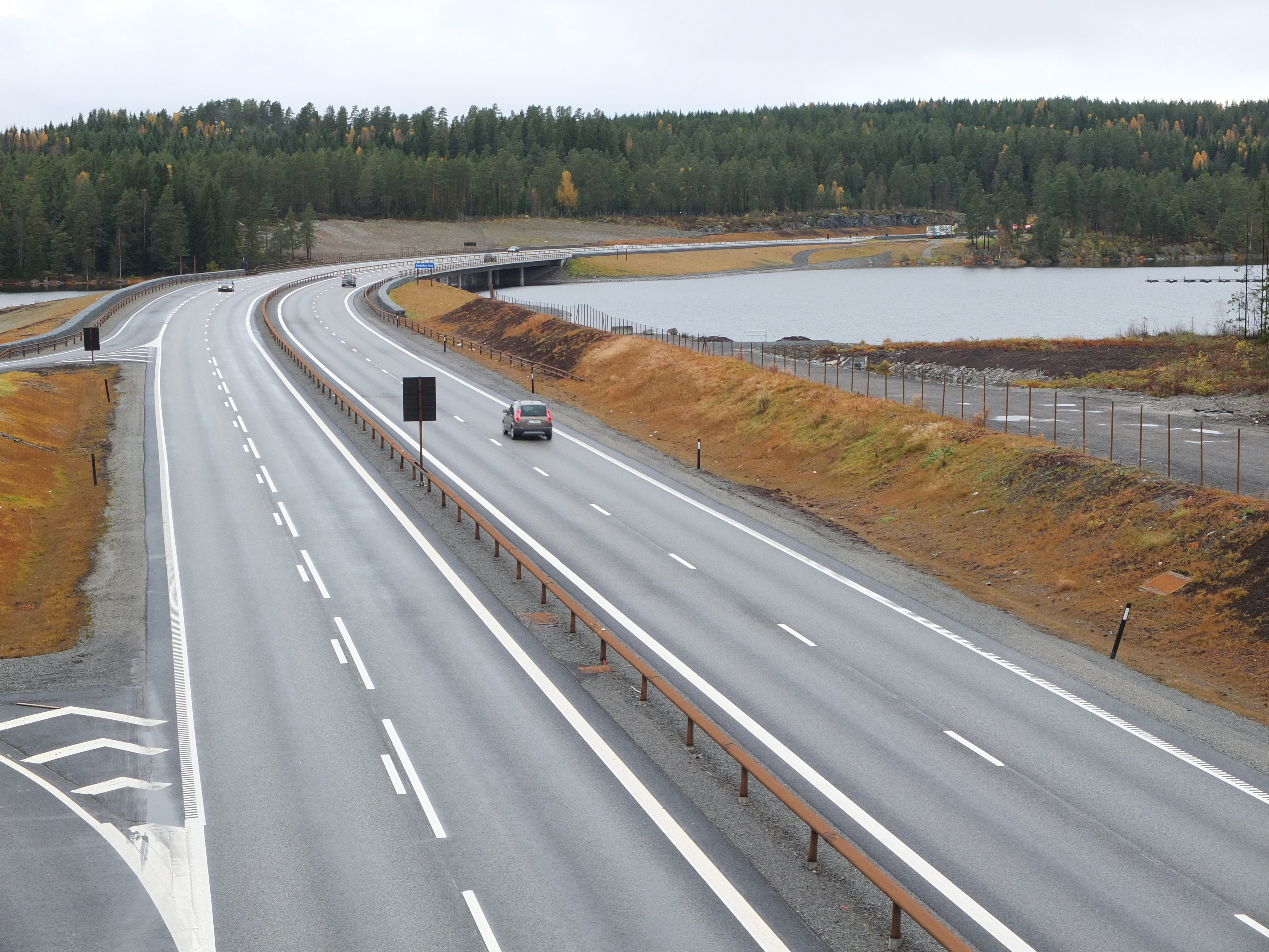 E6 ved Andelv i Eidsvoll